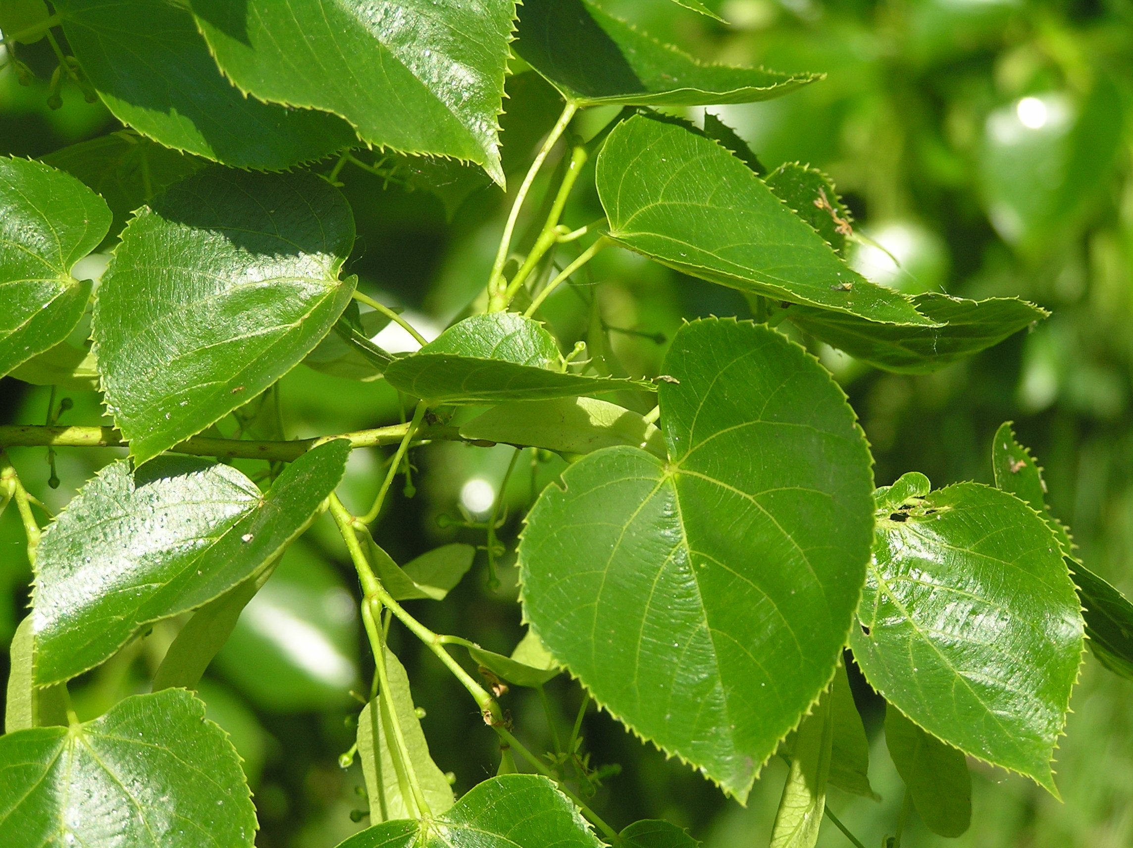 Tilia × euchlora, cultivated in Lipník nad Bečvou, Czech Republic